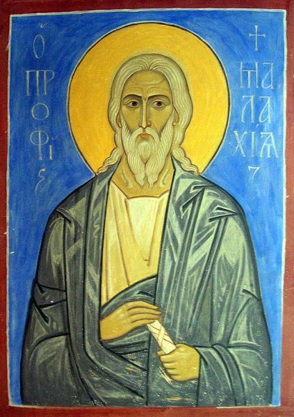 Malachi (ortodox icon)